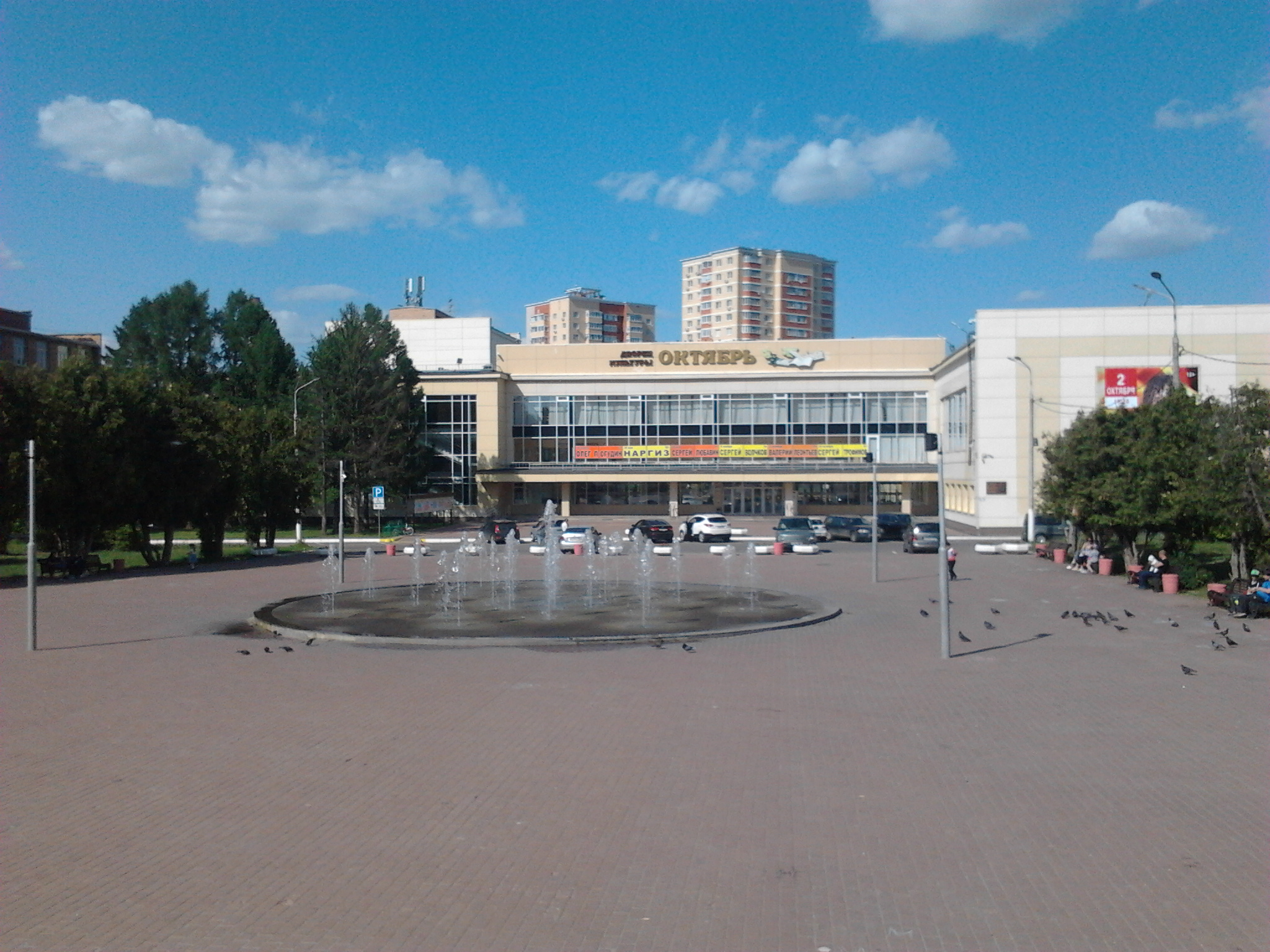 Дом культуры «Октябрь»